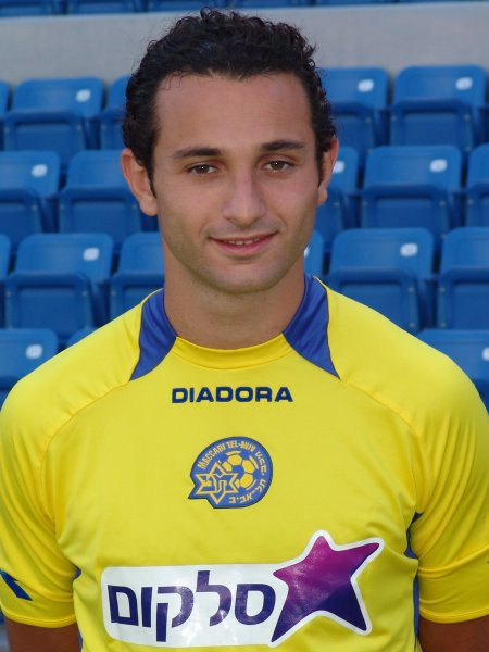 רודי חדד, שחקן מכבי תל אביב (Ruddi Hadad of Maccabi Tel Aviv)